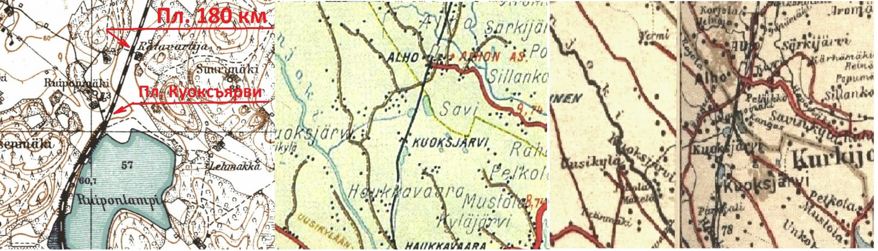 Схемы расположения пл. 180 км и пл. Куоксъярви.